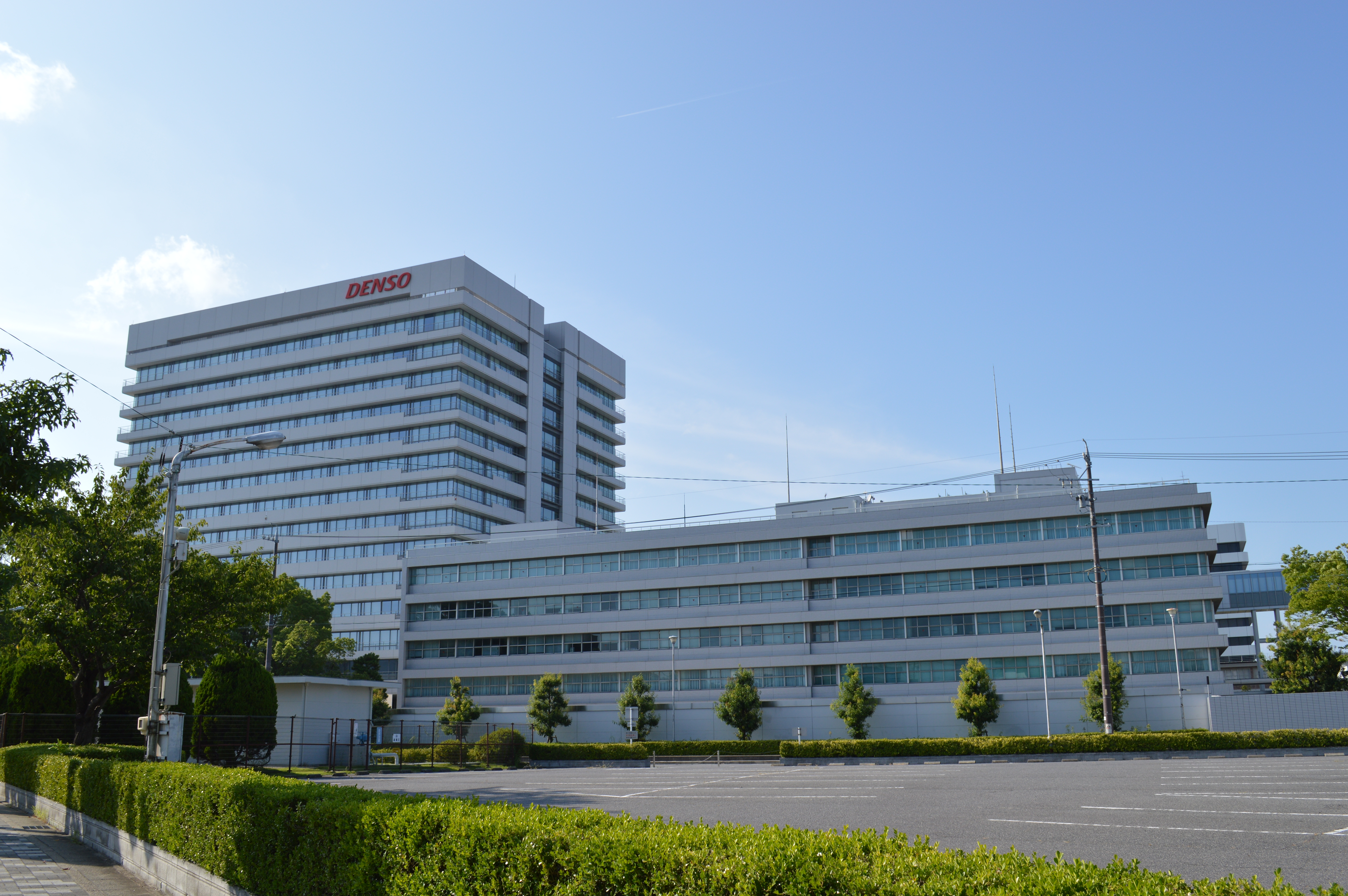 愛知県刈谷市にあるデンソー本社ビル